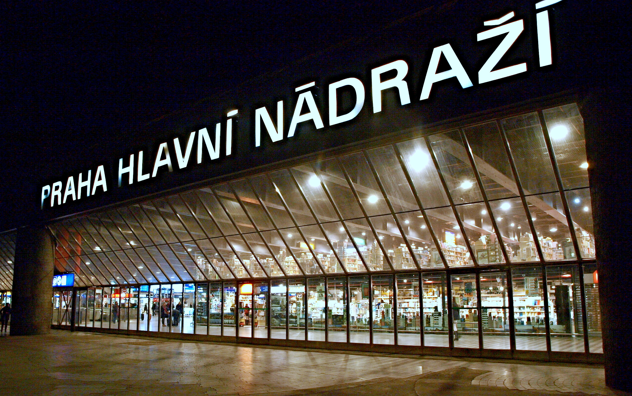 Praha Hlavní nádraží vestibul